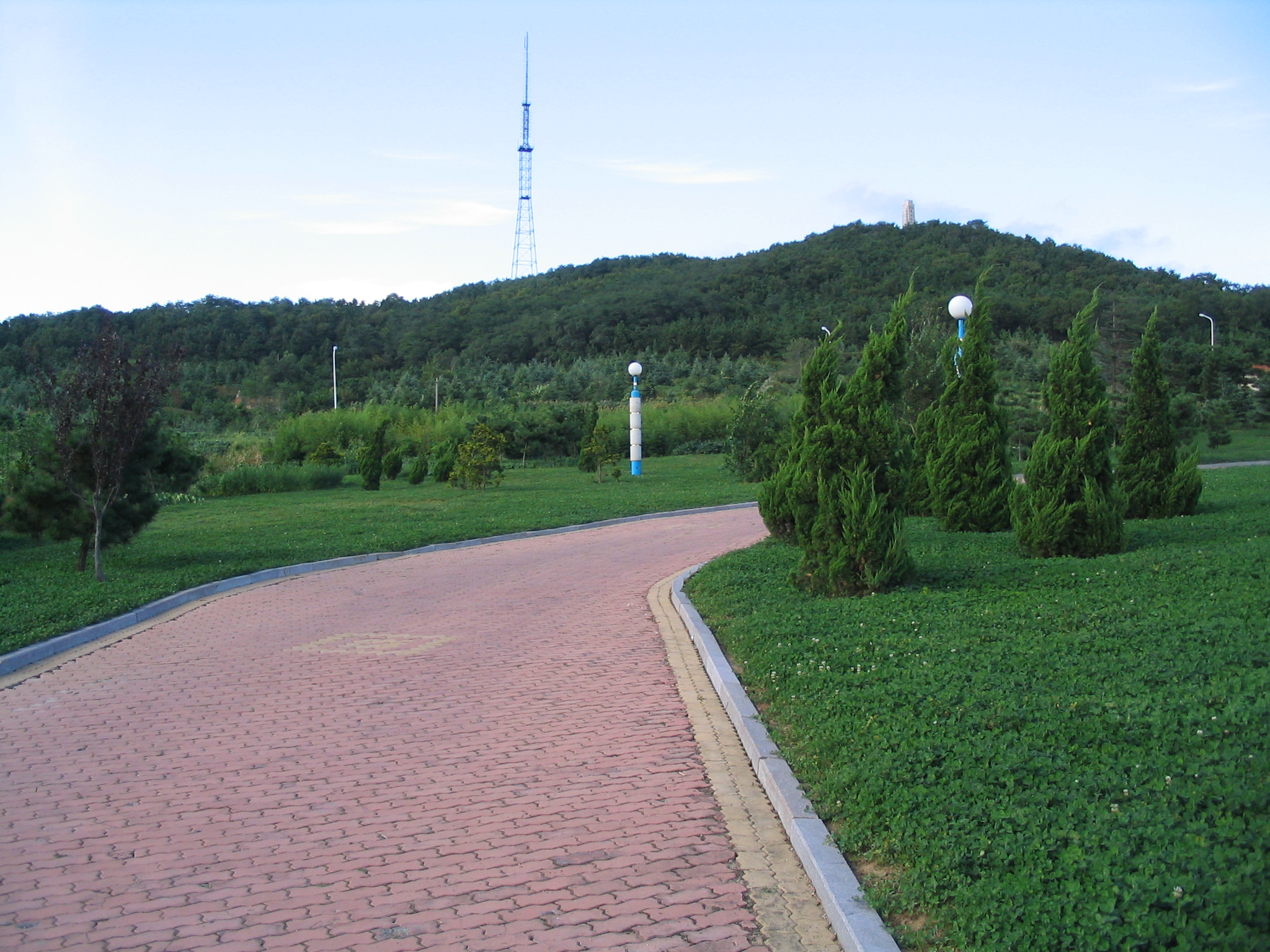 山东省文登市区空气质量指数在23的峰山公园 人类健康需要多栽树少栽花